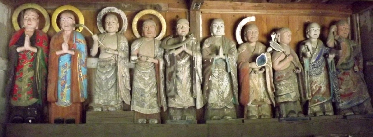 恩山寺の十大弟子